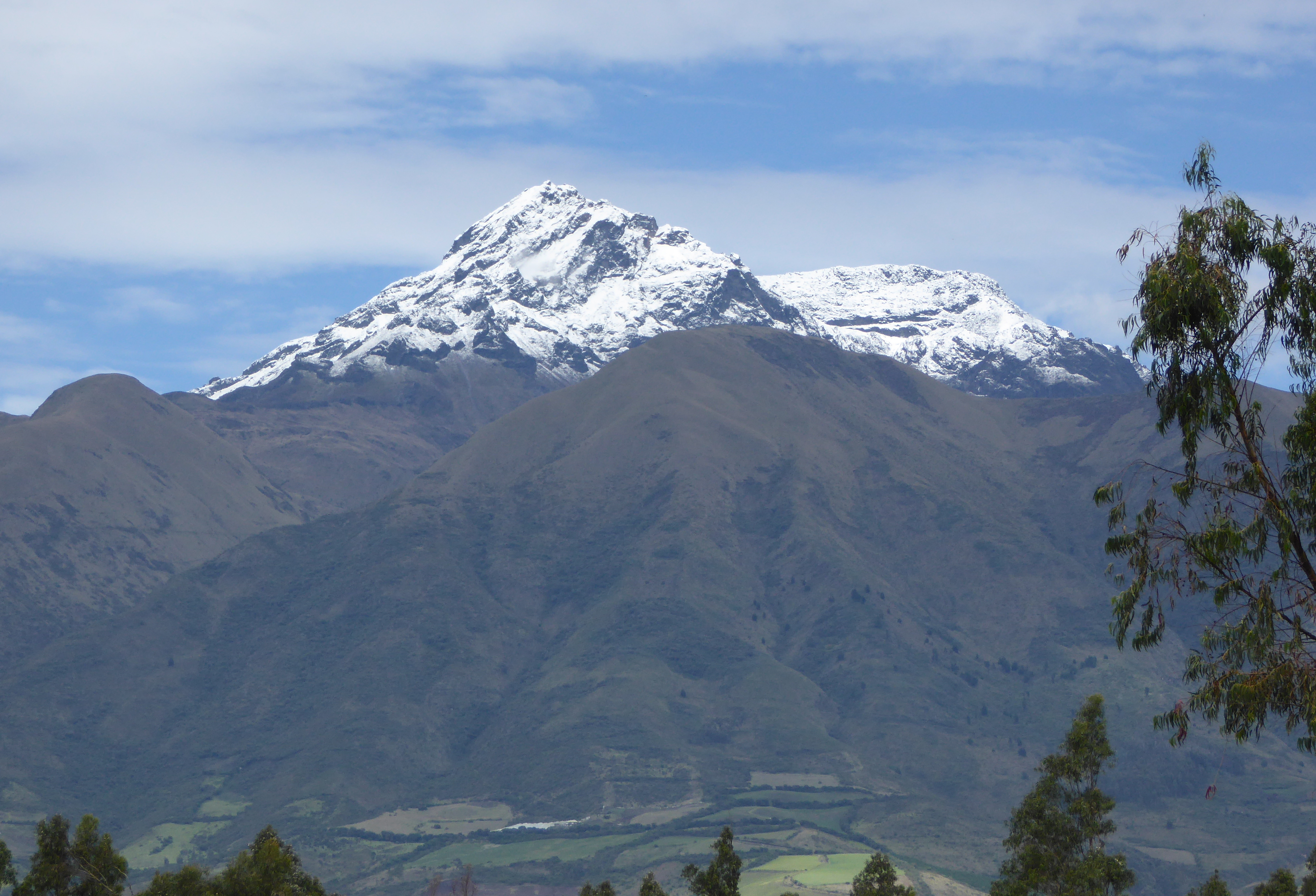 Schnee auf dem Cotacachi